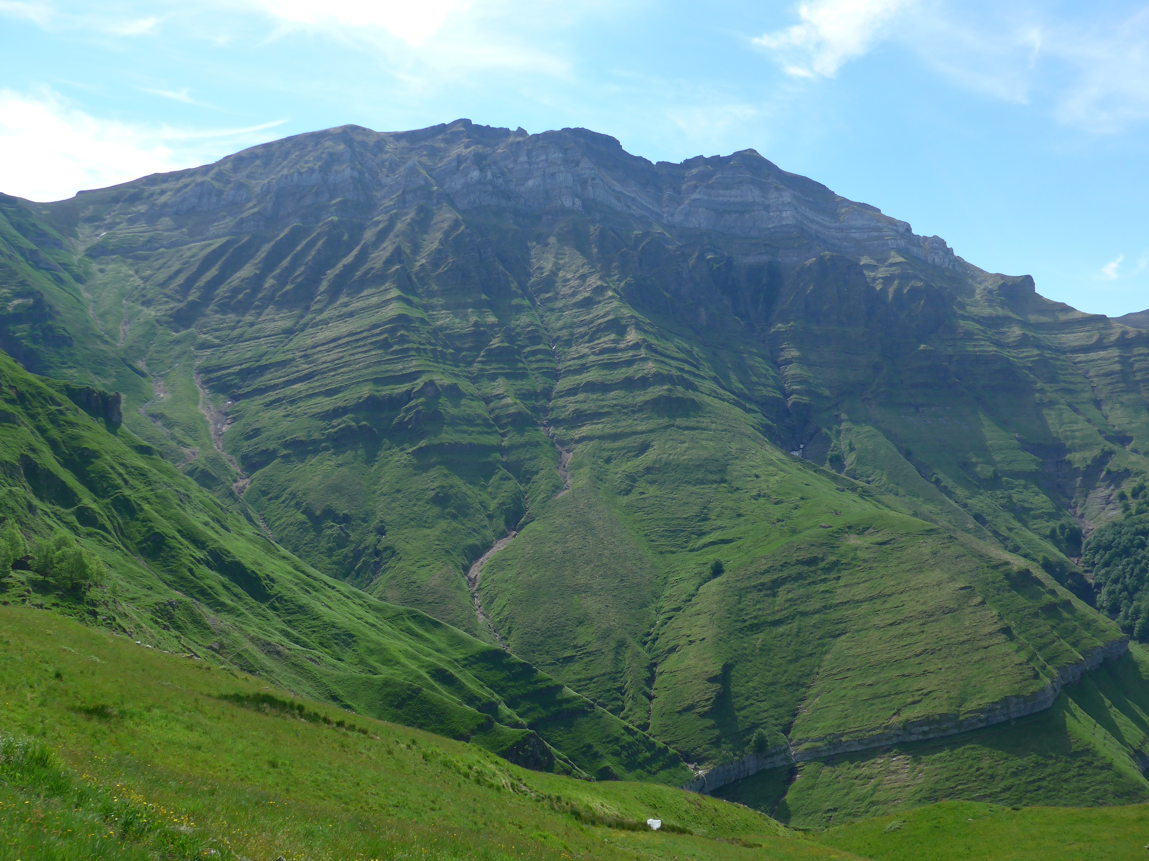 El Castro Valnera (1718 m) es la máxima elevación de las montañas pasiegas.